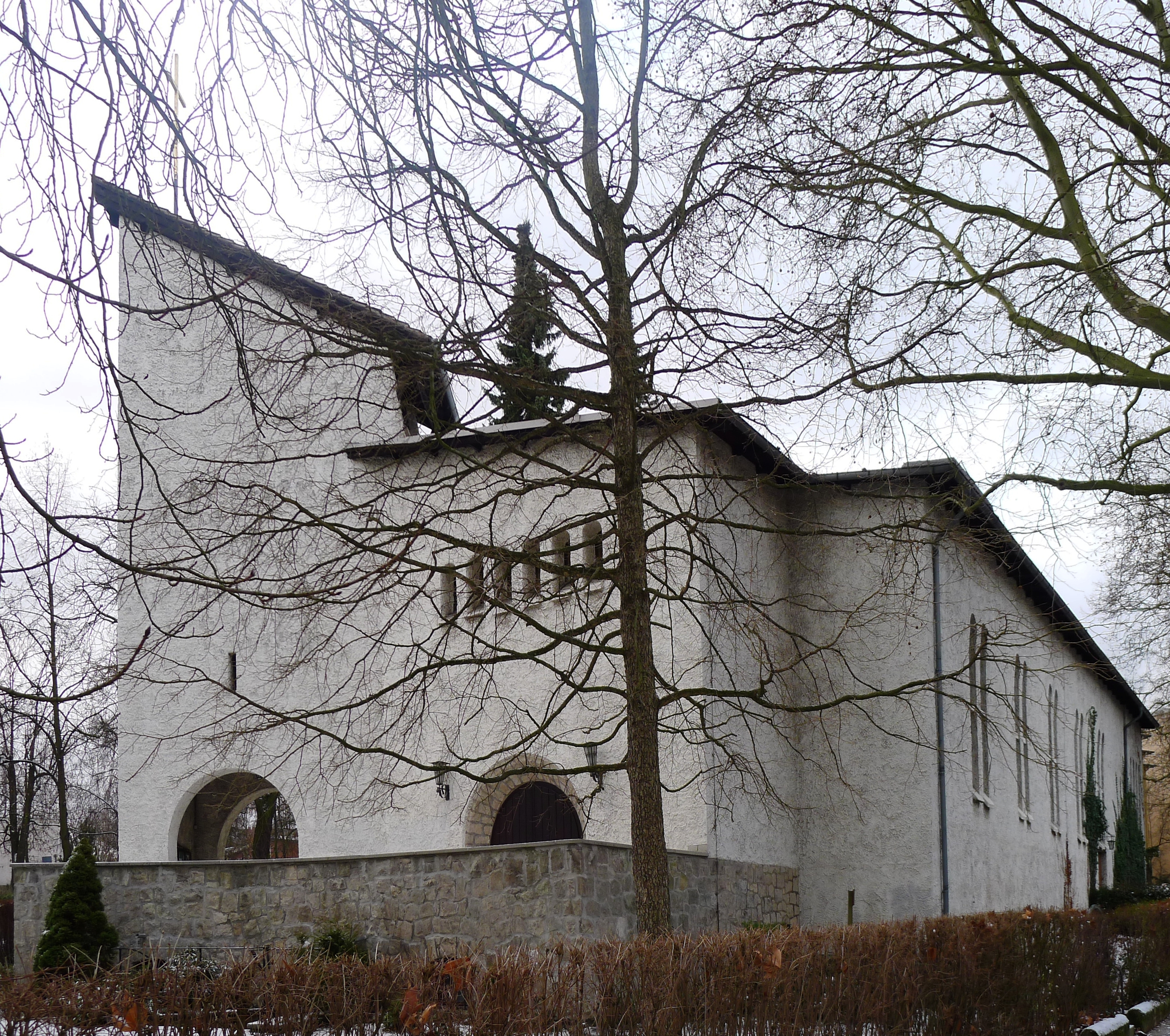 Links der Turm, in der Mitte an der Querriegel mit dem Vorraum und der Orgelempore, rechts das Kirchenschiff.